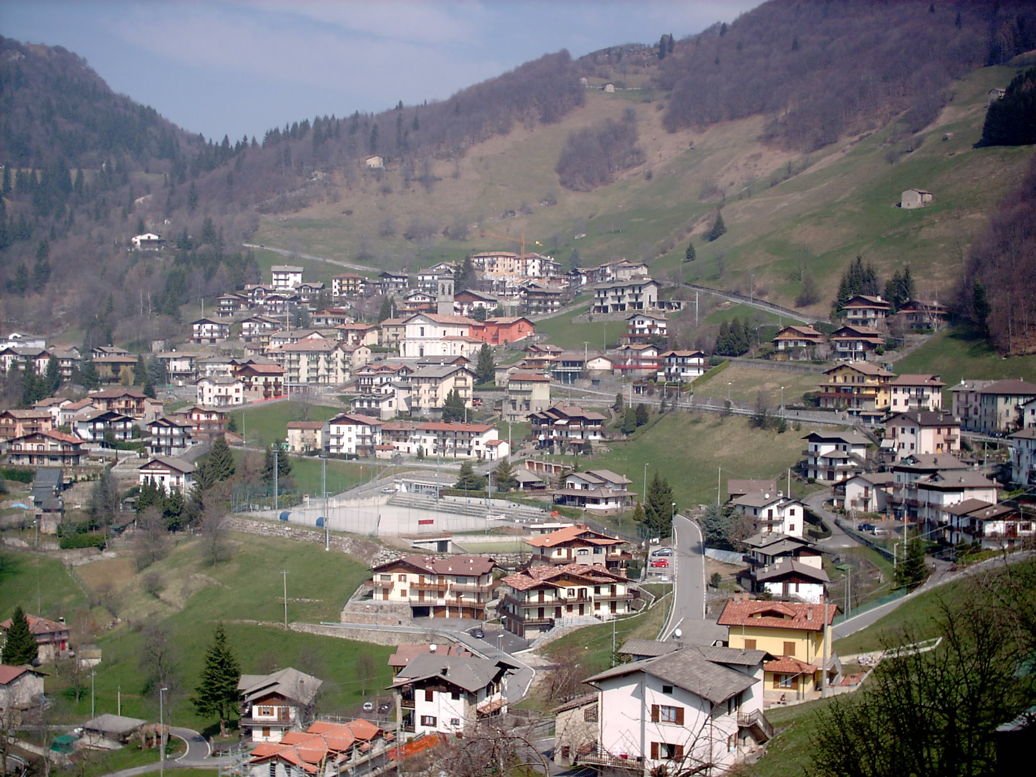 Aviatico, Bergamo, Italia